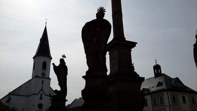 Osečná - sousoší na náměstí